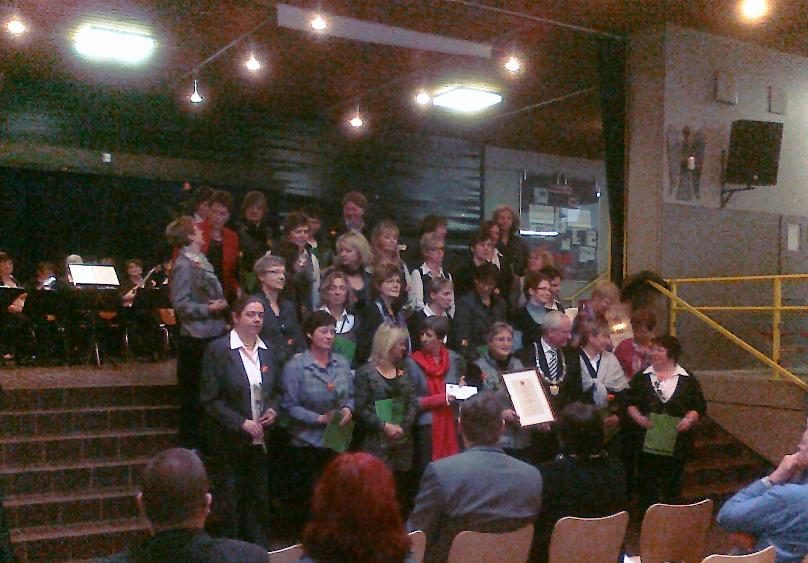 Bürgerpreisverleihung an die Schlemmerfeen der Snedwinkela Realschule in Neuenkirchen